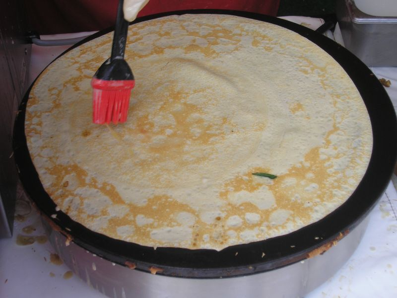 Crêpe en train de dorer